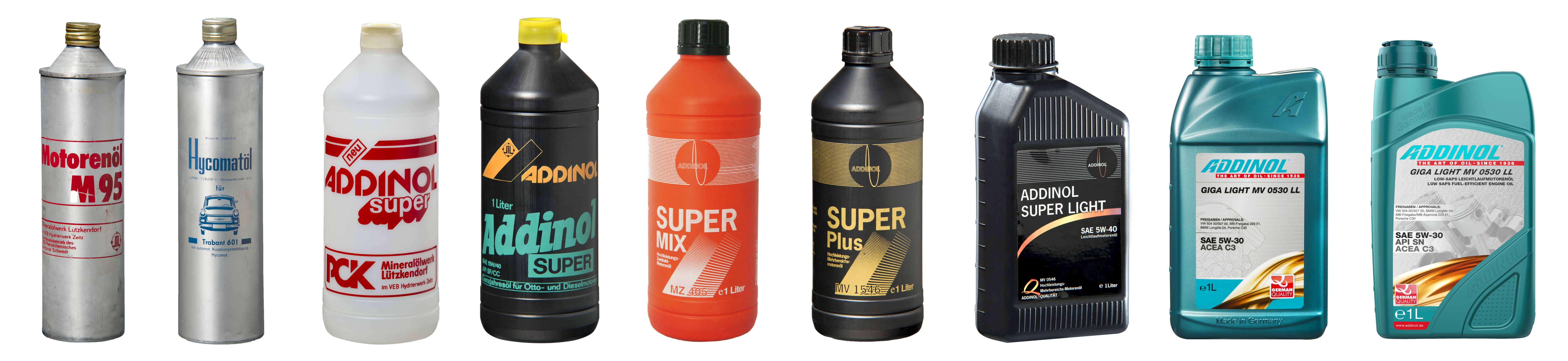 Gebinde von ADDINOL von 1950 bis heute (von links nach rechts)